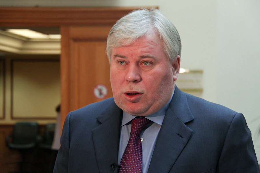 Анатолий Кучерена — российский адвокат